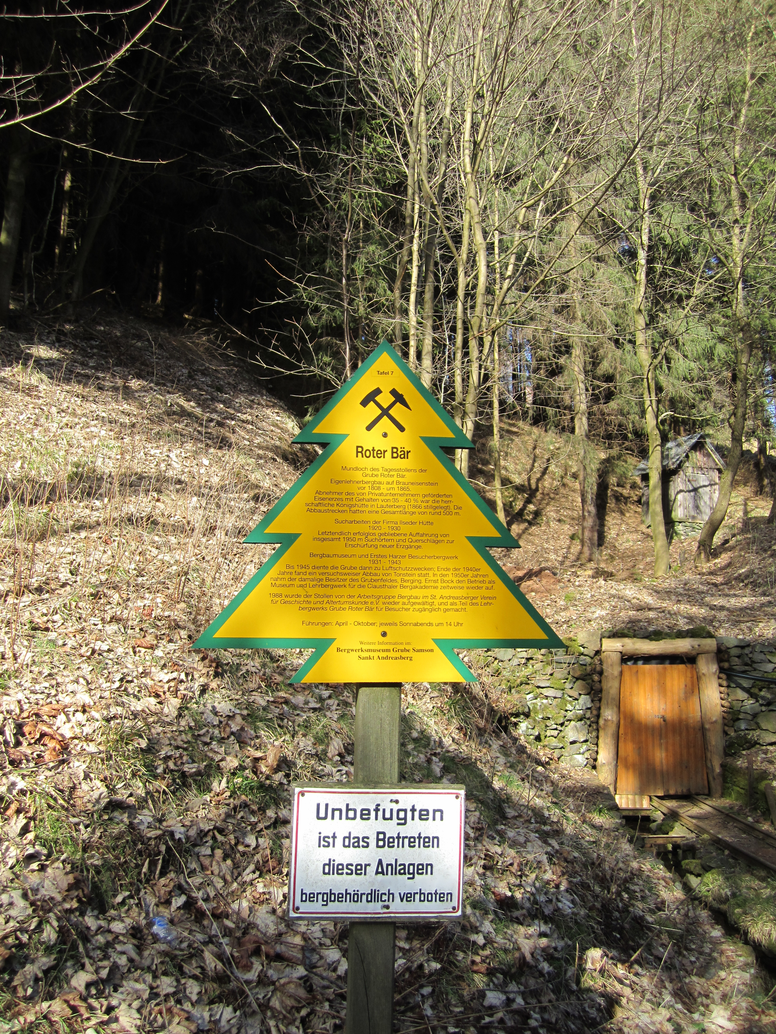 Mundloch mit Dennerttanne der Grube Roter Bär in Sankt Andreasberg, Niedersachsen, Deutschland.